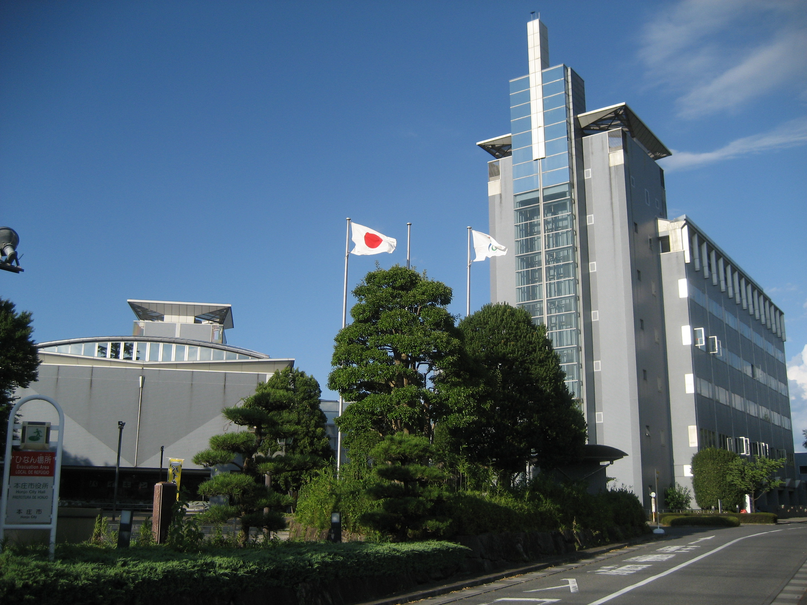 埼玉県本庄市役所庁舎